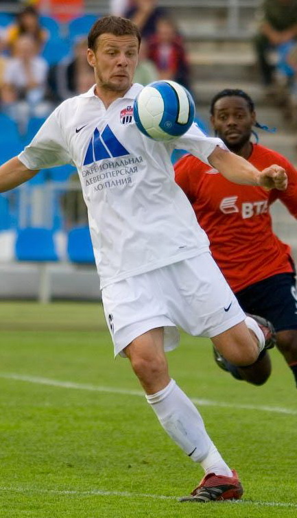 Vukašin Trivunović